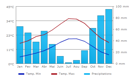 Climat Seville, Andalousie - Espagne